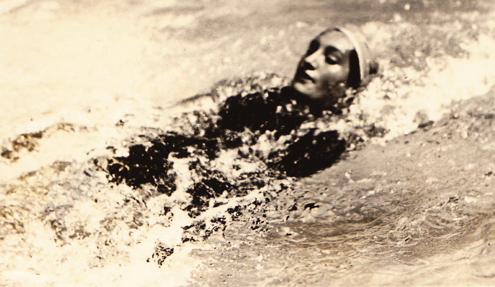 Iet van Feggelen demonstreert haar formidabele rugslag.